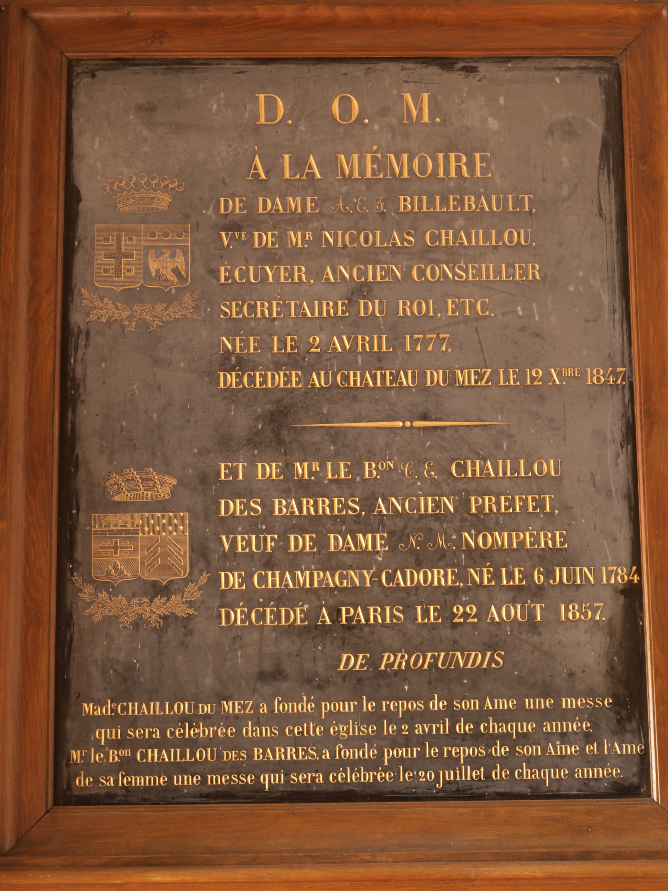 Sainpuits (Yonne, France) ; l'intérieur de l'église sainte Marie-Madeleine, plaque commémorative à la mémoire de la famille Chaillou des Barres.